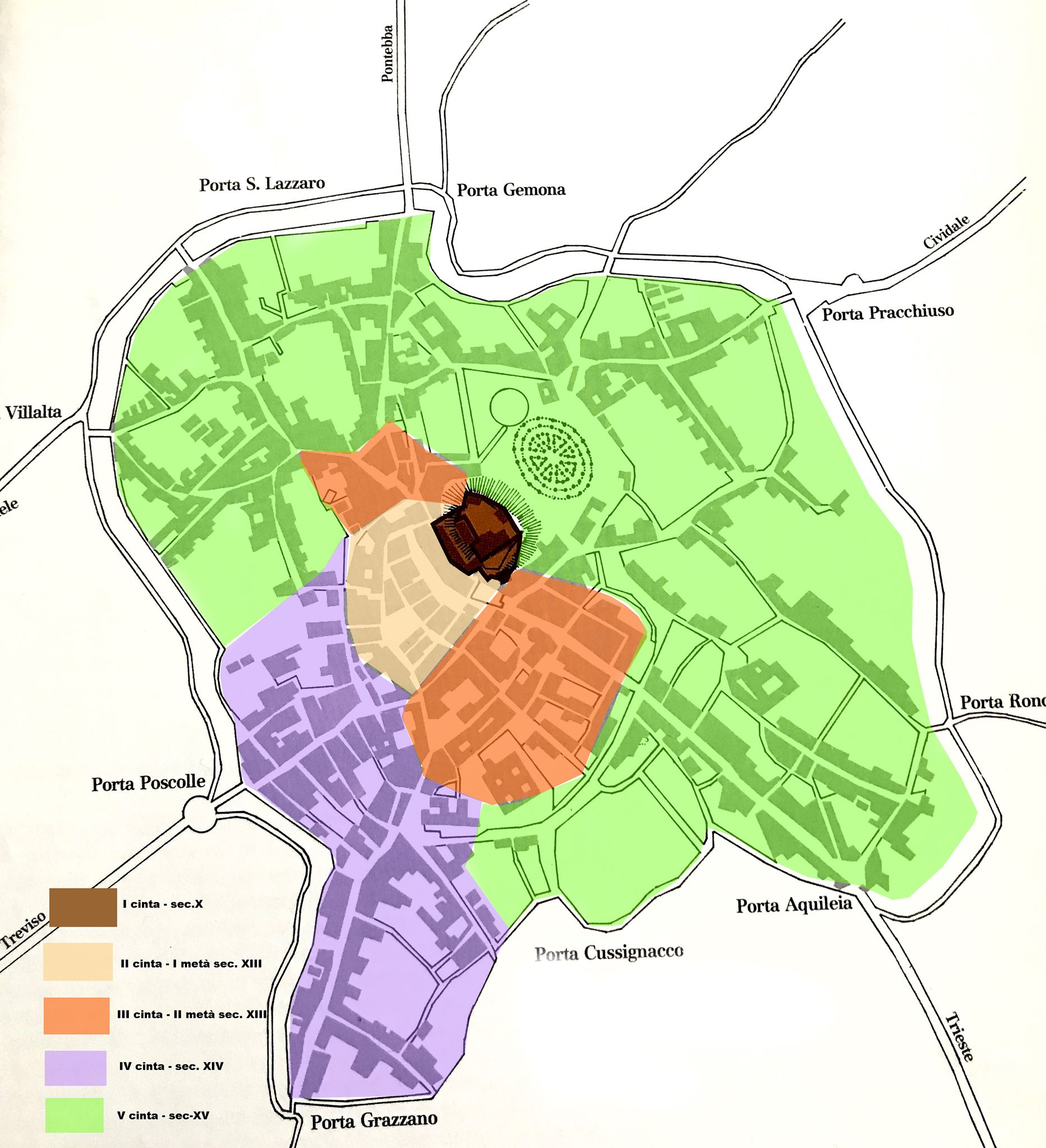 Mappa delle cerchie di Udine